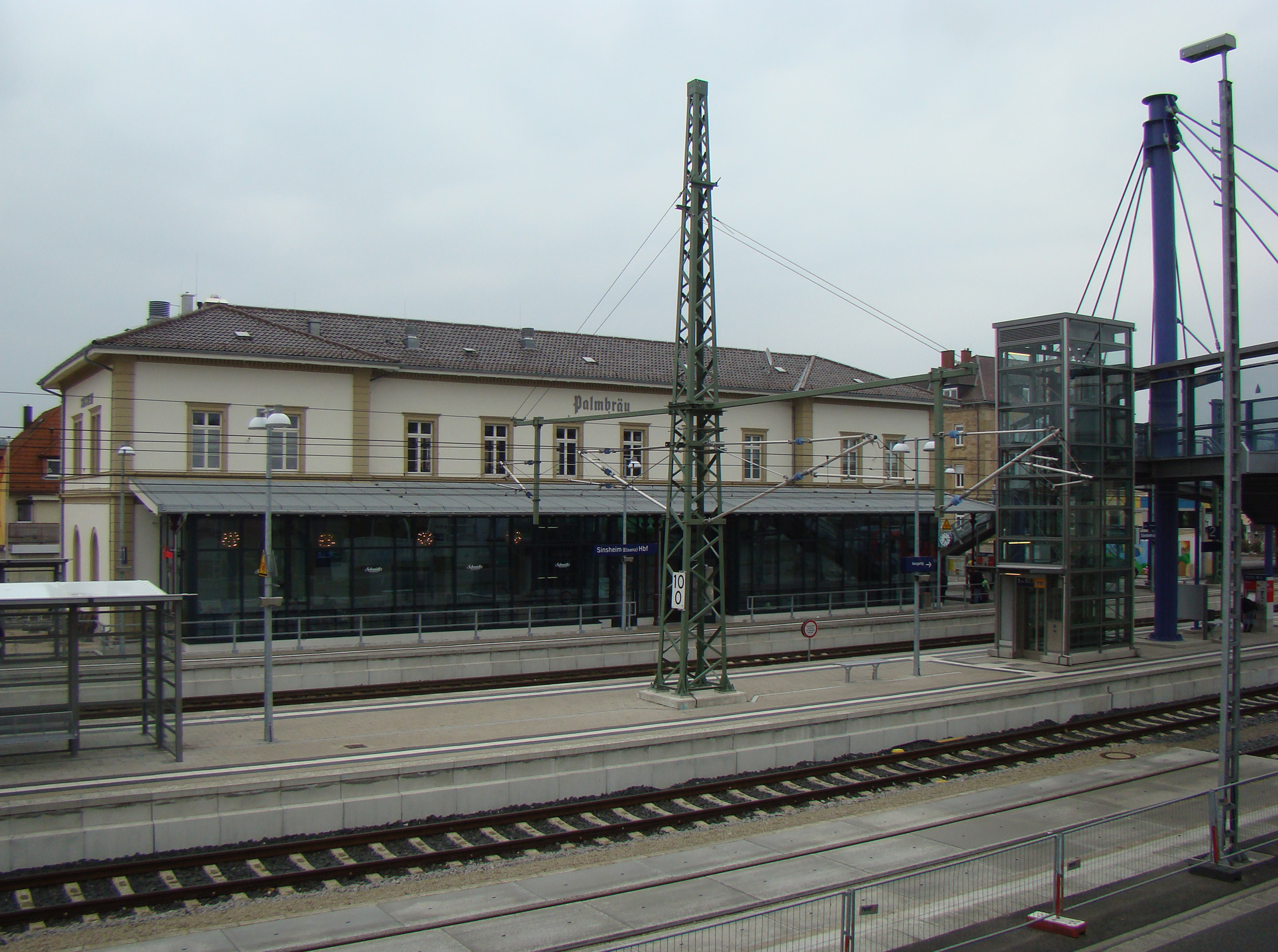 Sinsheim Hauptbahnhof